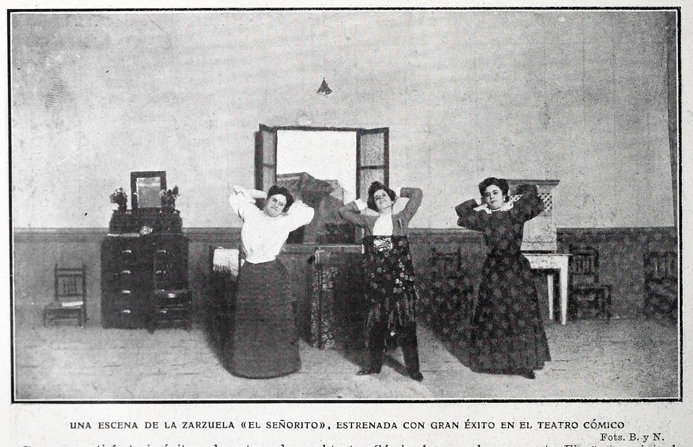 Una escena de la zarzuela "El señorito", estrenada con gran éxito en el Teatro Cómico.